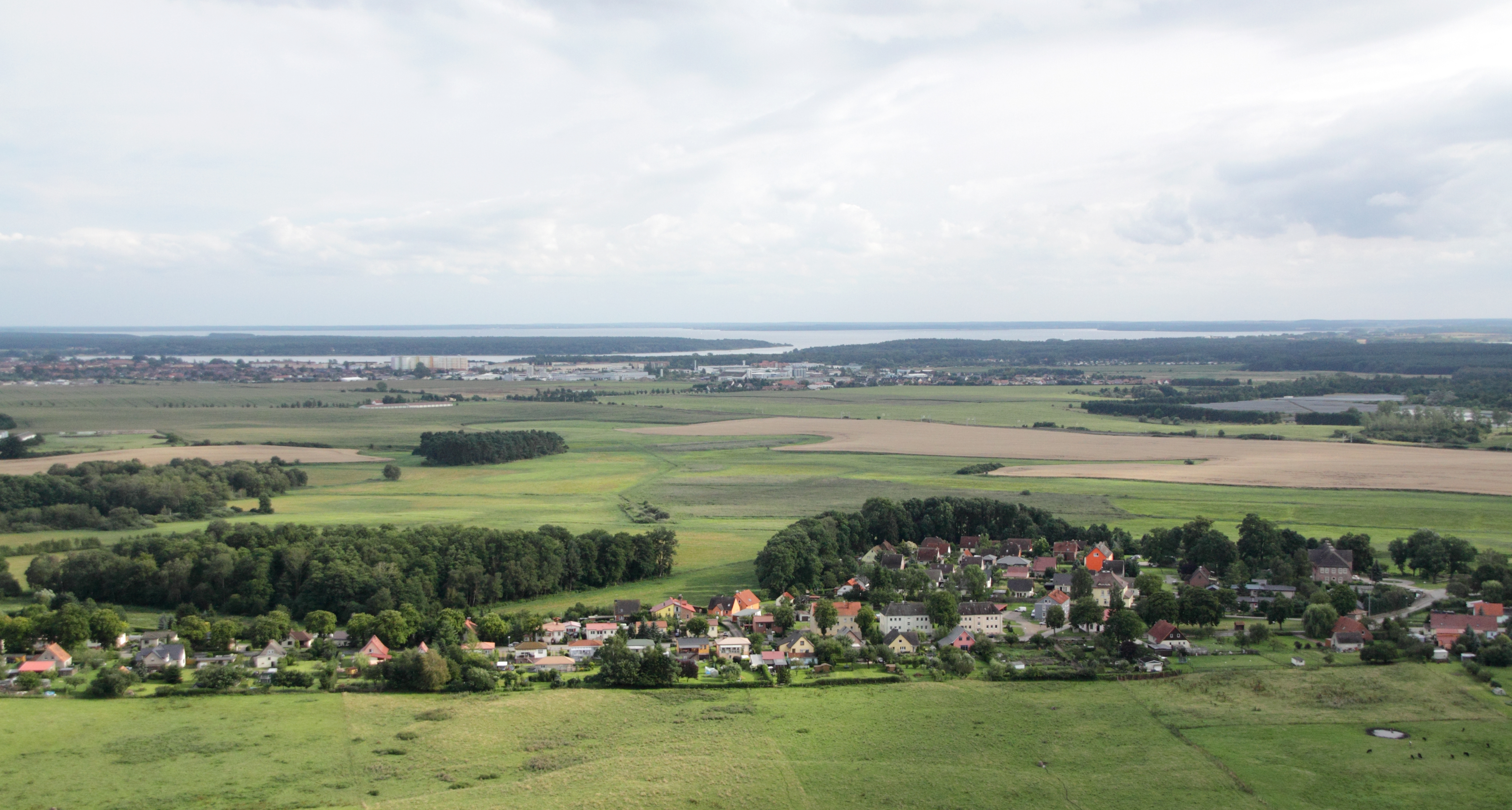 Fotoflug Waren-Müritz und Umgebung: Blick auf Vielist, Waren und Müritz im Hintergrund